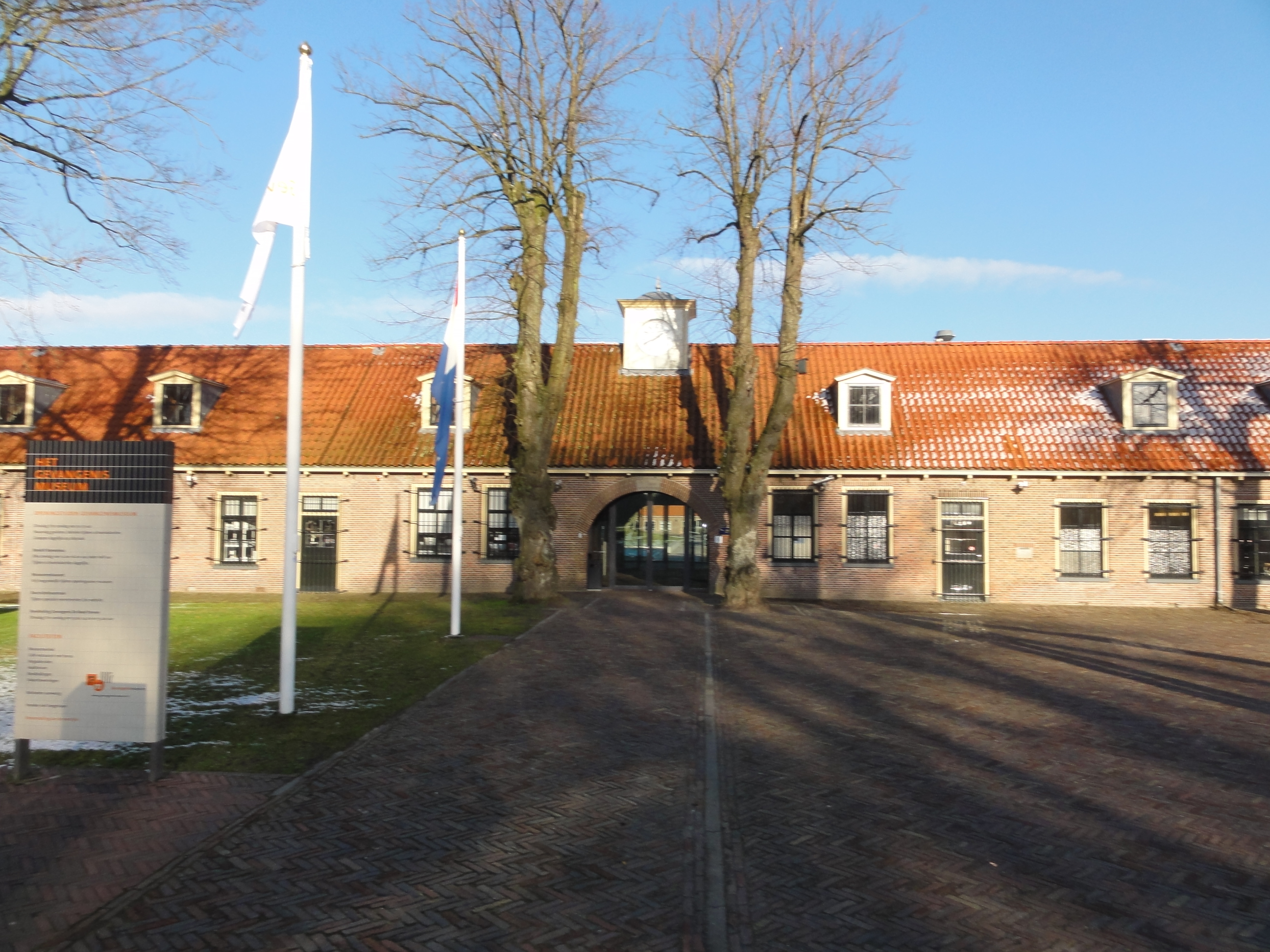 Het Nationaal Gevangenismuseum is gevestigd in een voormalig werkgesticht aan de Oude Gracht 1 in Veenhuizen.